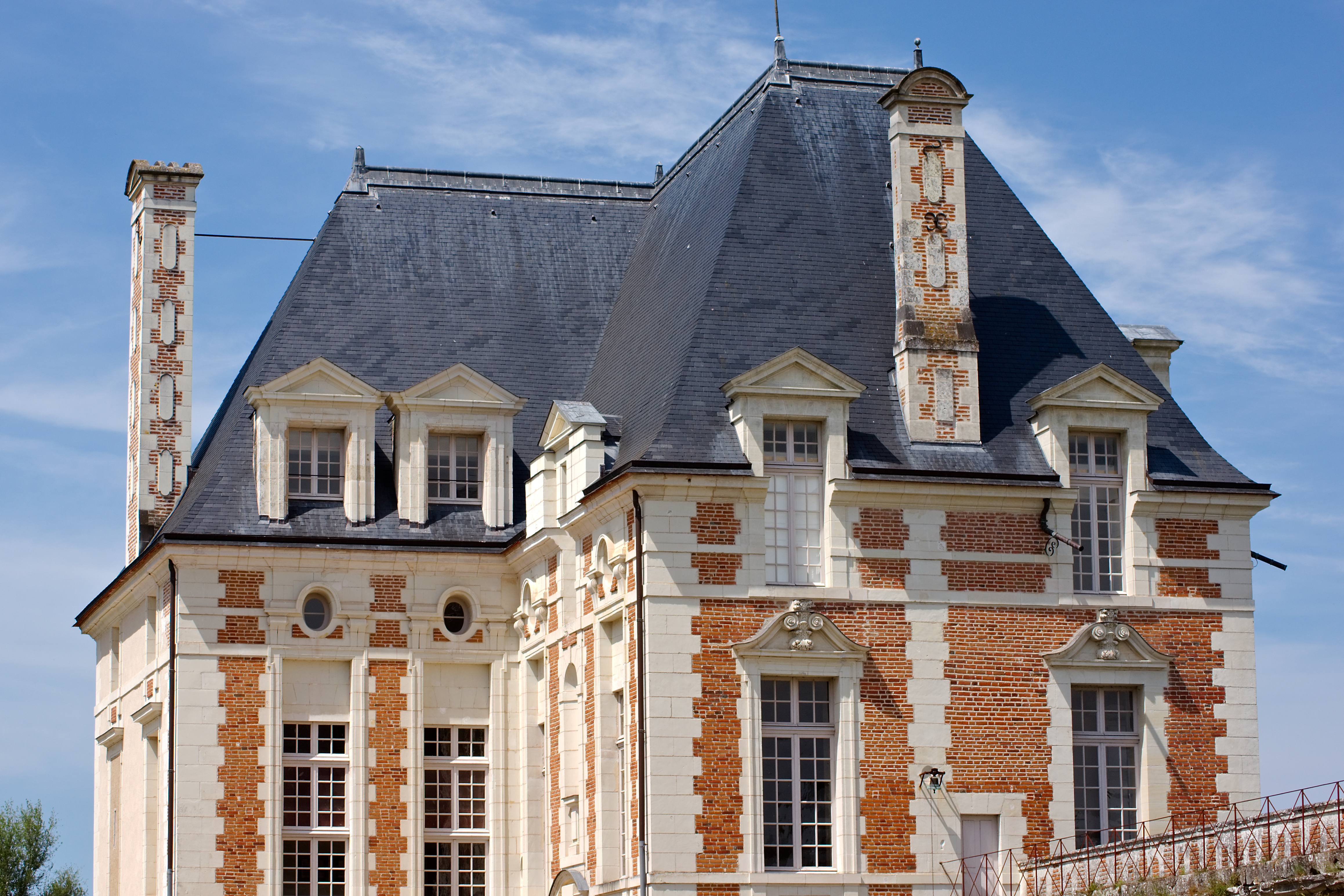 Château de Selles-sur-Cher